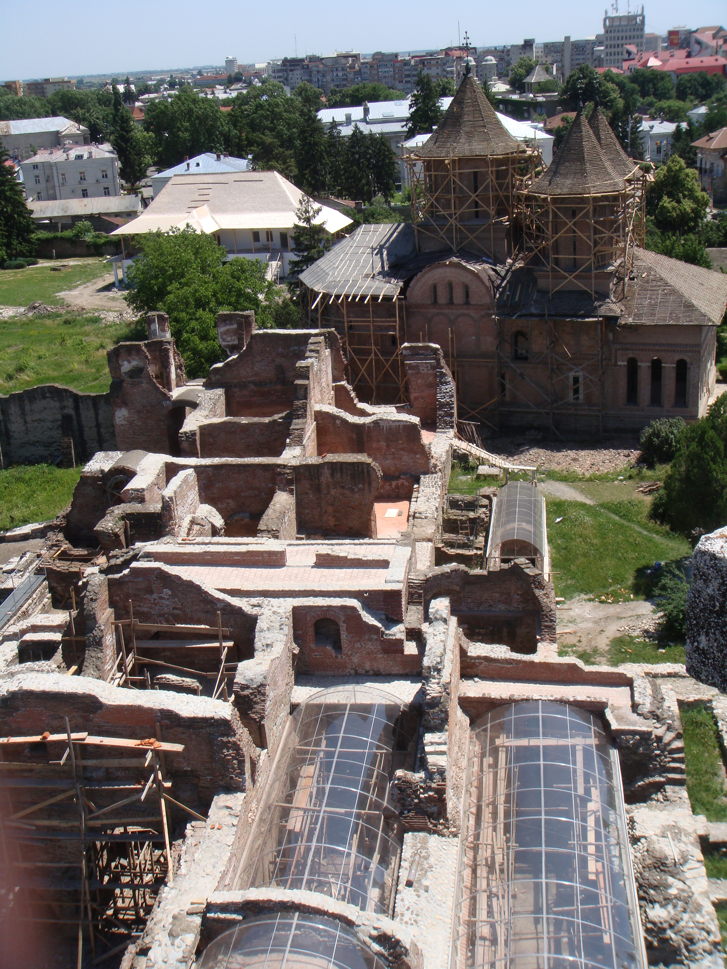 Ruine incinta Turnul Chindiei 04